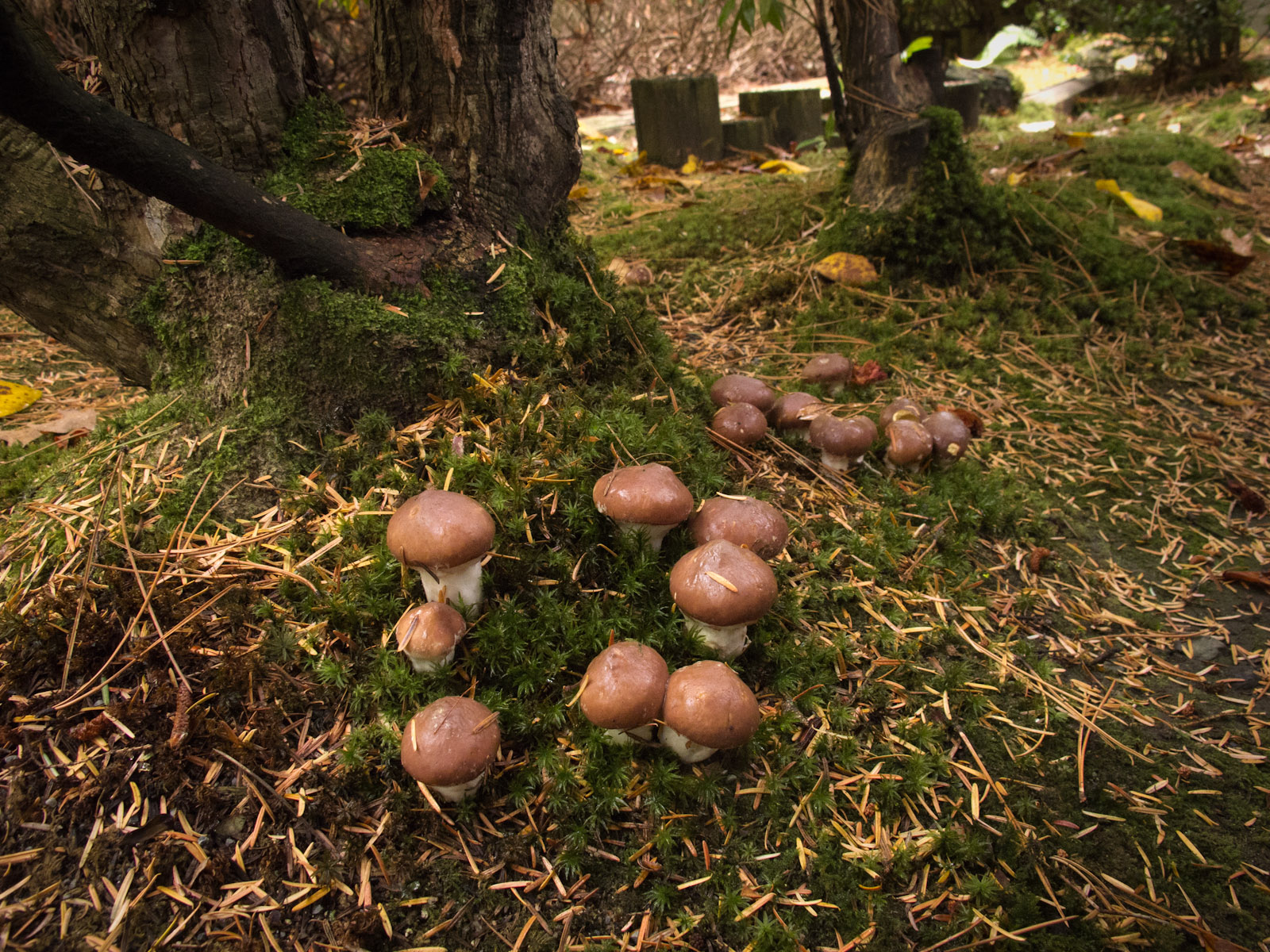 Suillus luteus (L.) Roussel